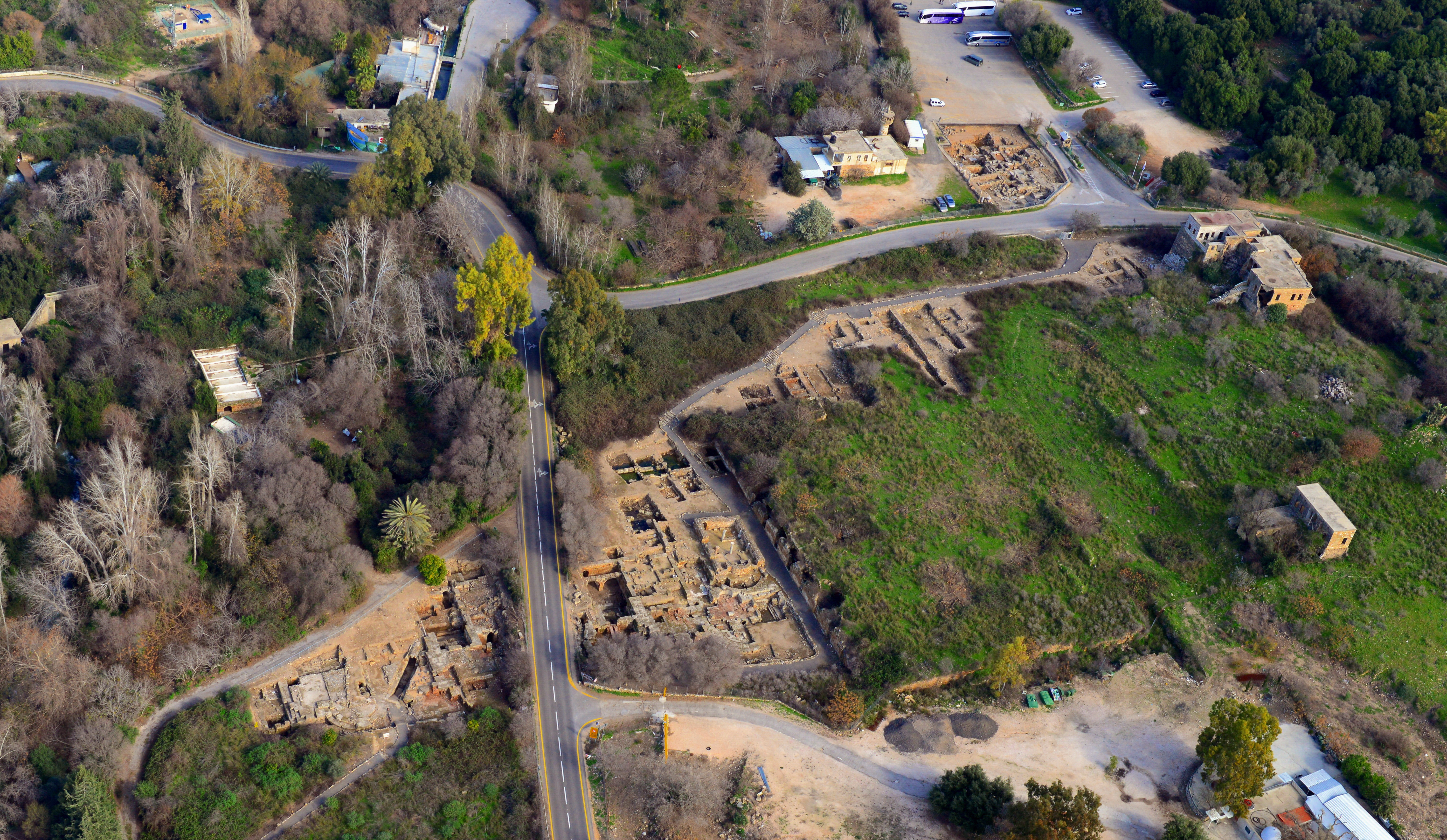 בניאס הוא אתר ארכאולוגי בו נמצאים שרידיה של עיר קדומה שהתקיימה בתקופות שונות לאורך ההיסטוריה והגיעה לשיא פריחתה בתקופה הרומית. האתר ממוקם למרגלות הר החרמון, ובתוכו נמצאים מעיינות ממהם נובעים רוב מי נחל חרמון הנקרא גם "בניאס".